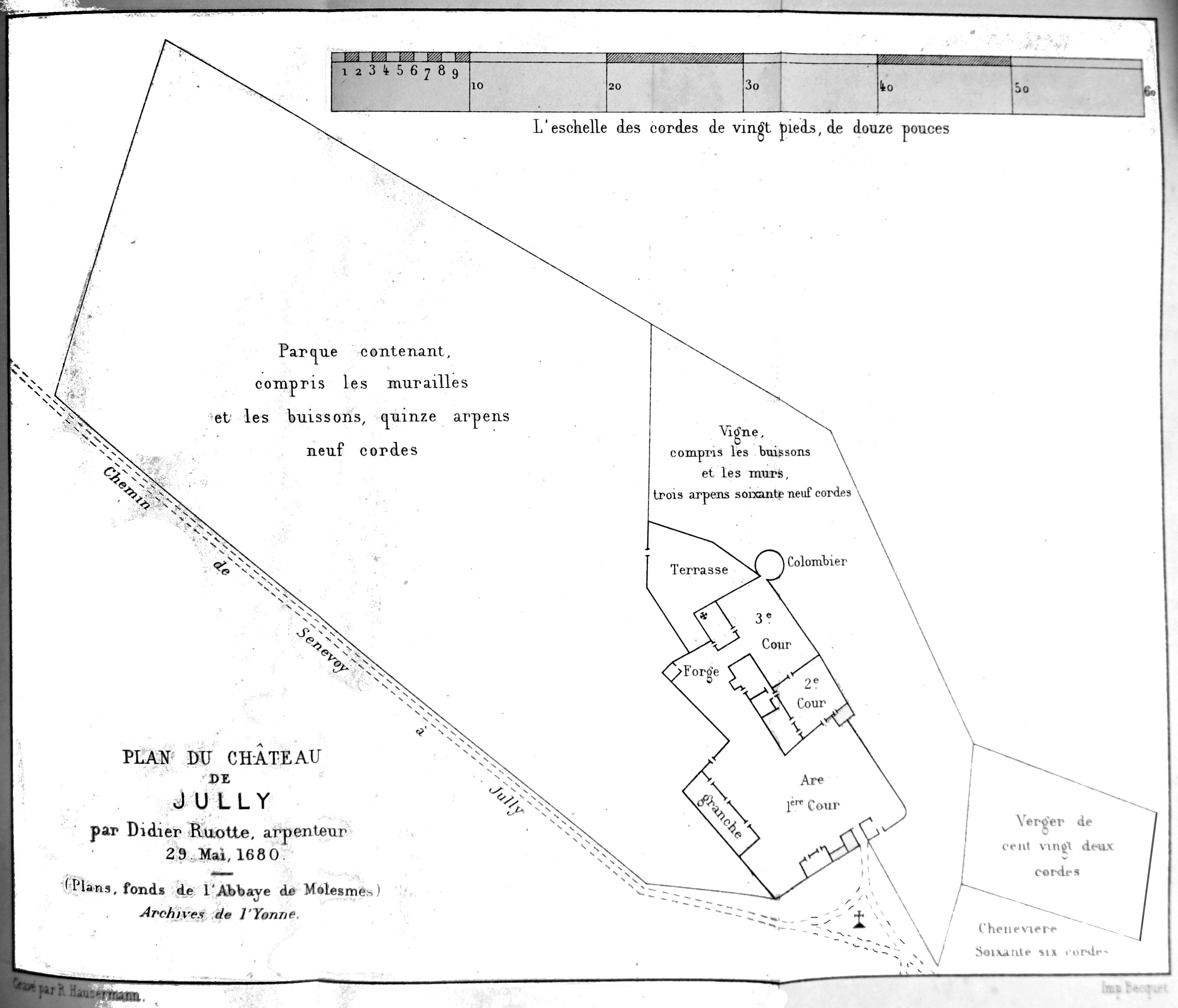 un plan de l'Abbaye de Jully-les-Nonnains.